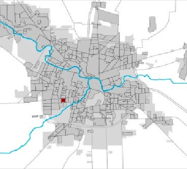 Ubicación del barrio Rosedal dentro de la ciudad de Córdoba